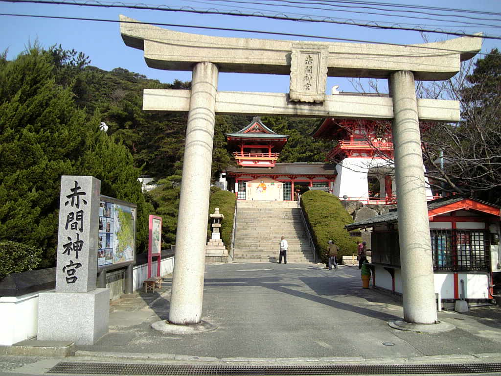 赤間神宮の鳥居。